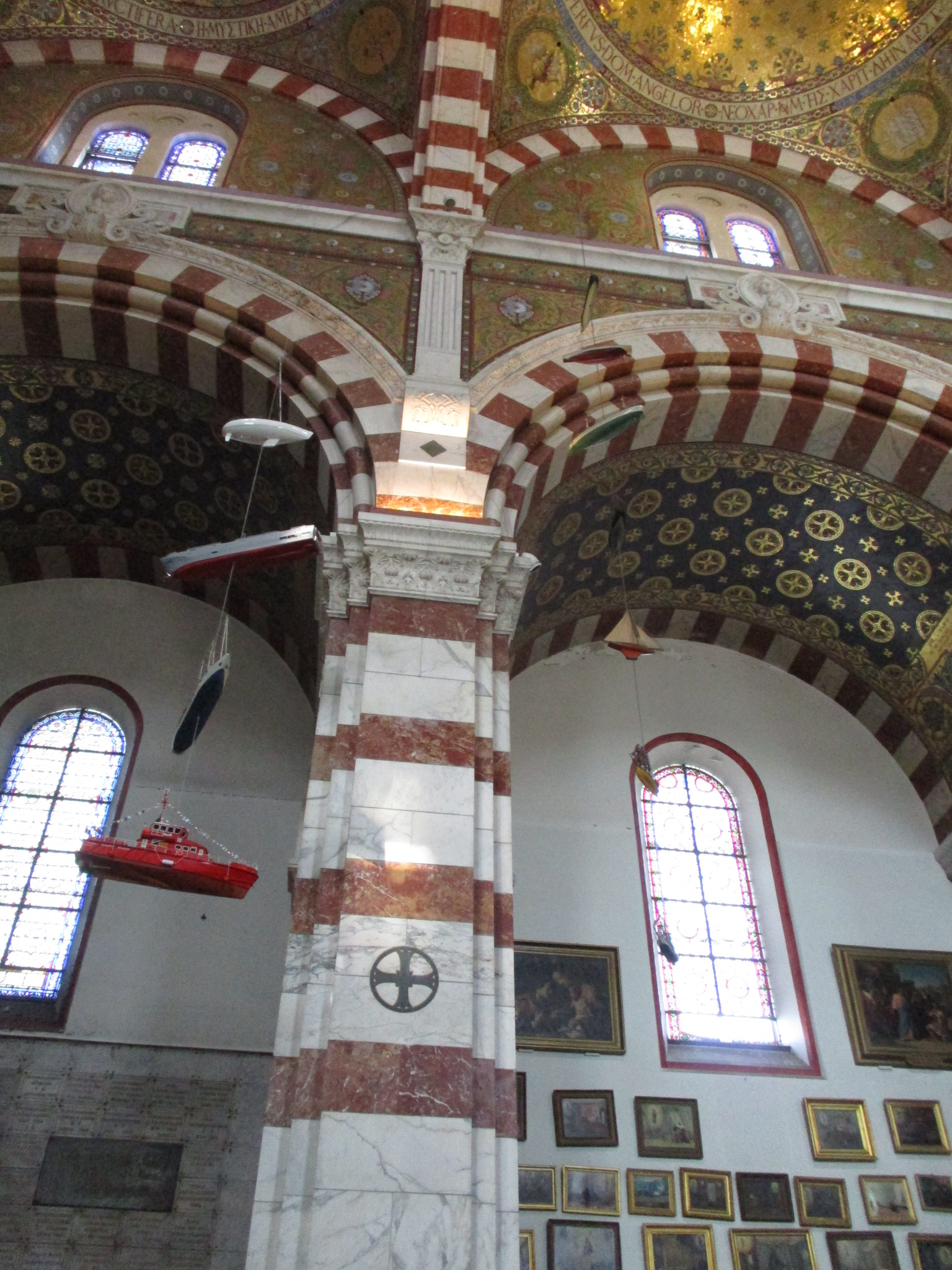 Ex-votos at Notre-Dame de la Garde